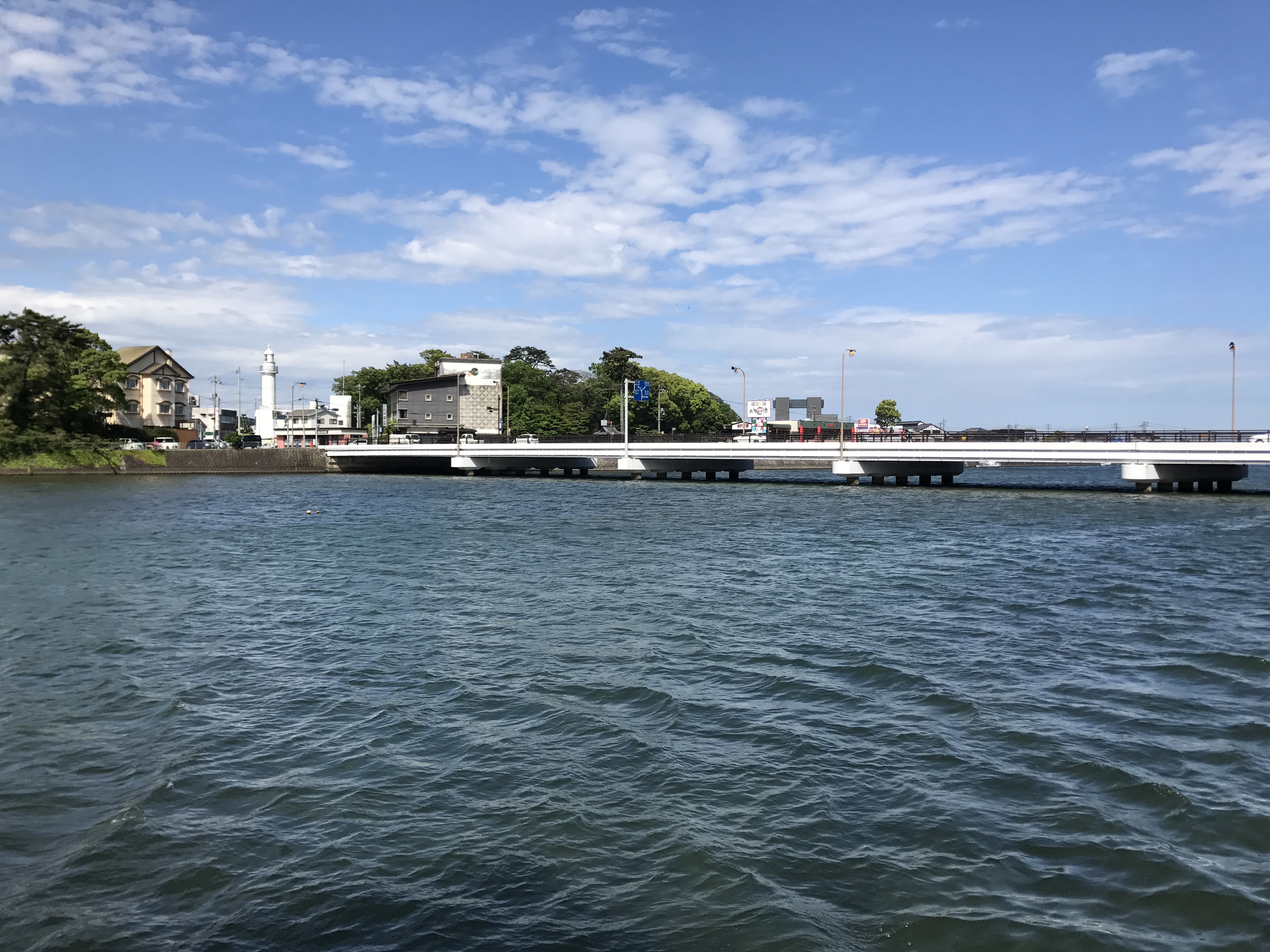 松本川に架かる萩橋